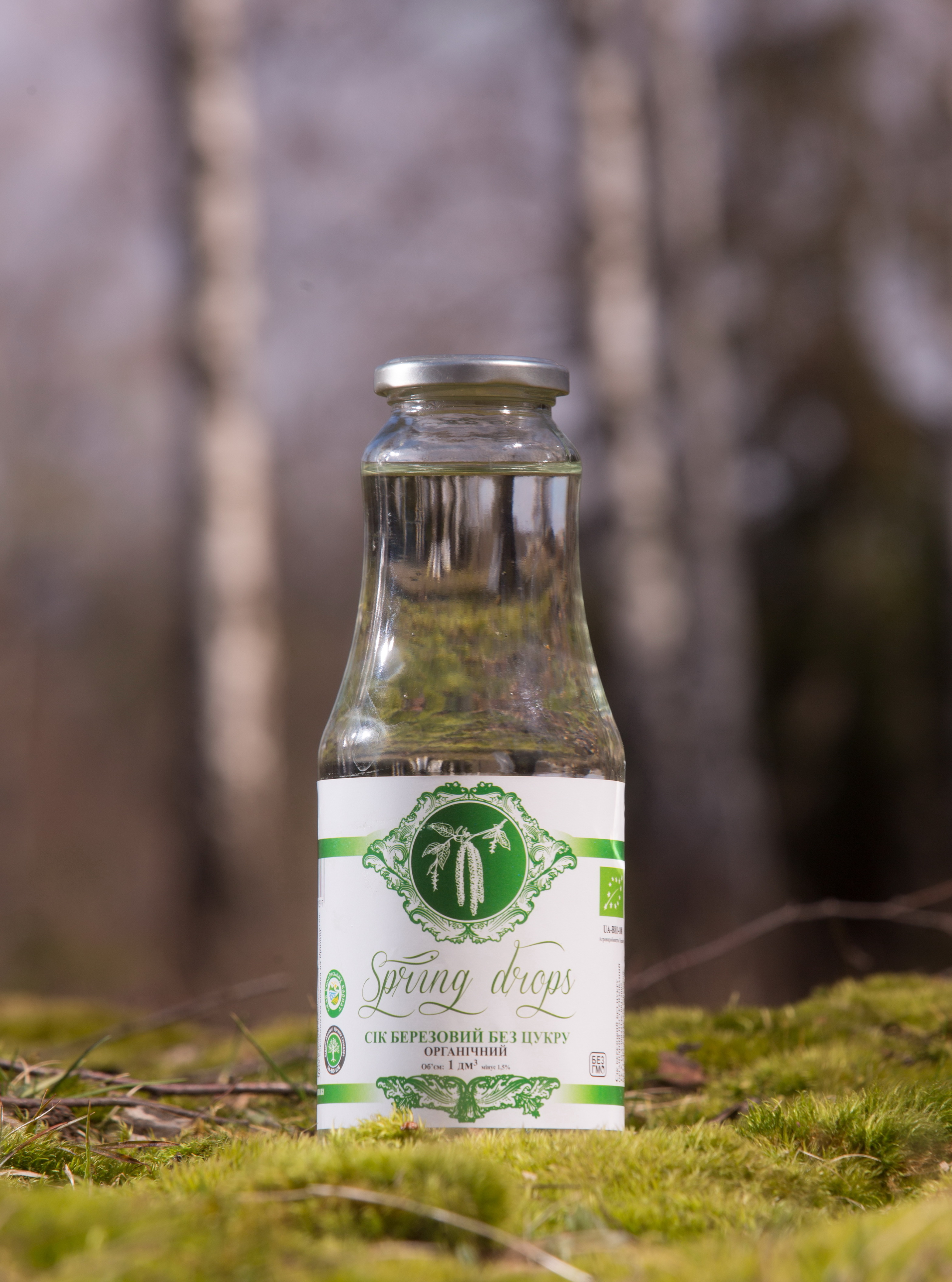 пляшка з березовим соком